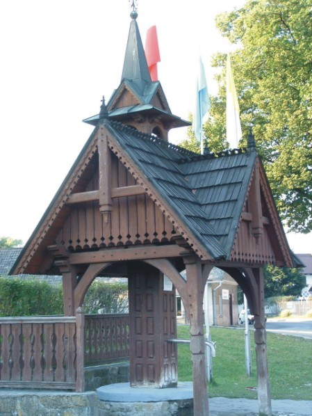 "Cudowne źródełko" w sanktuarium maryjnym w Ludźmierzu